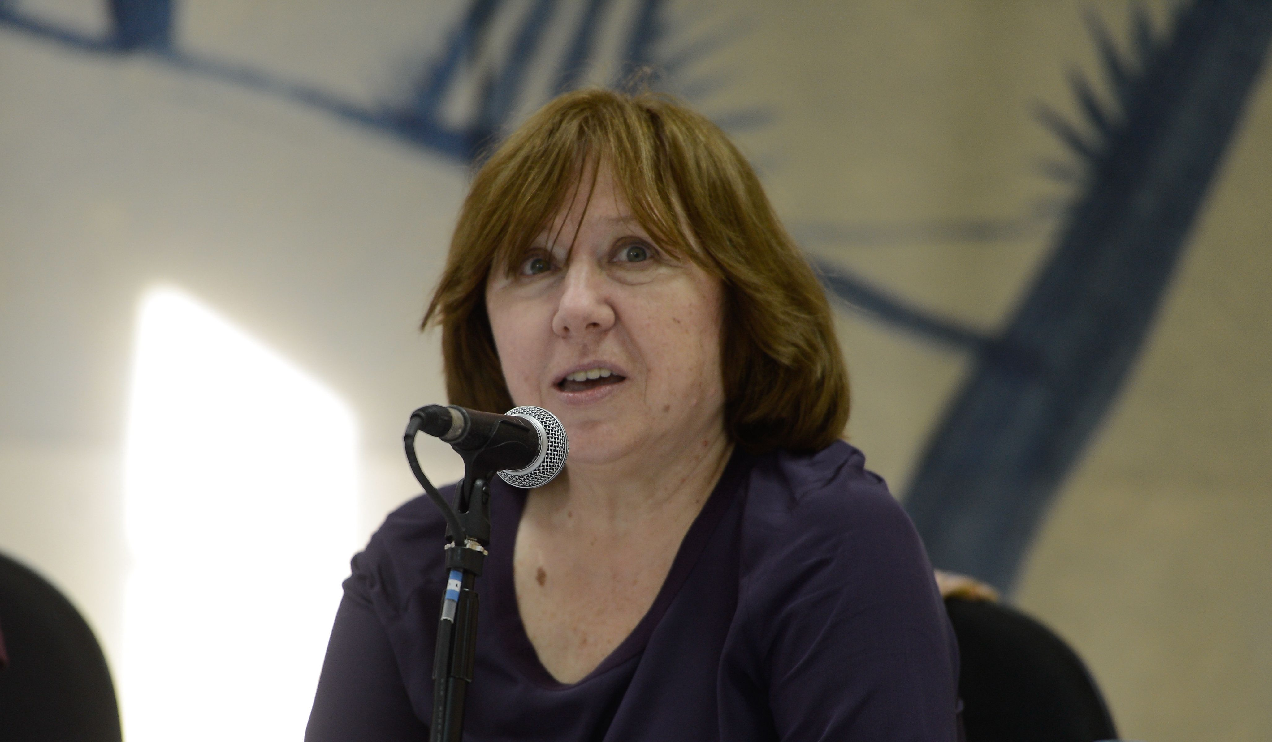 Paraty (RJ) - A vencedora do Nobel de Literatura de 2015, Svetlana Alexievich, durante entrevista coletiva na Festa Literária Internacional de Paraty.